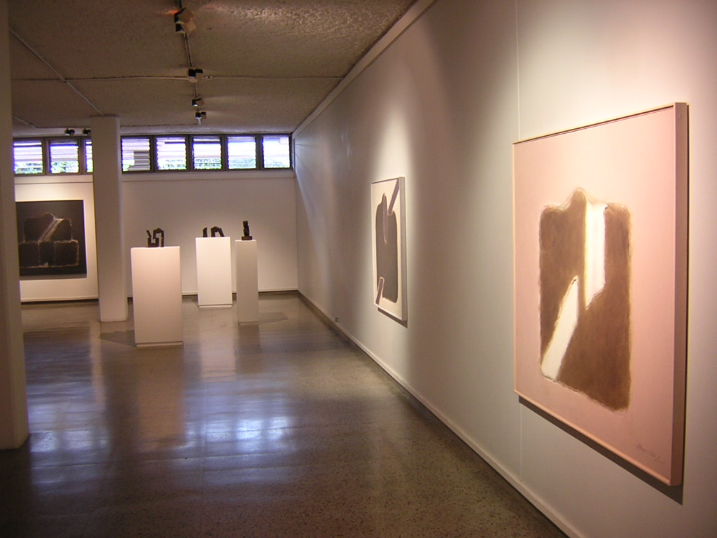 Museo Universitario Universidad de Antioquia. Medellín, Colombia